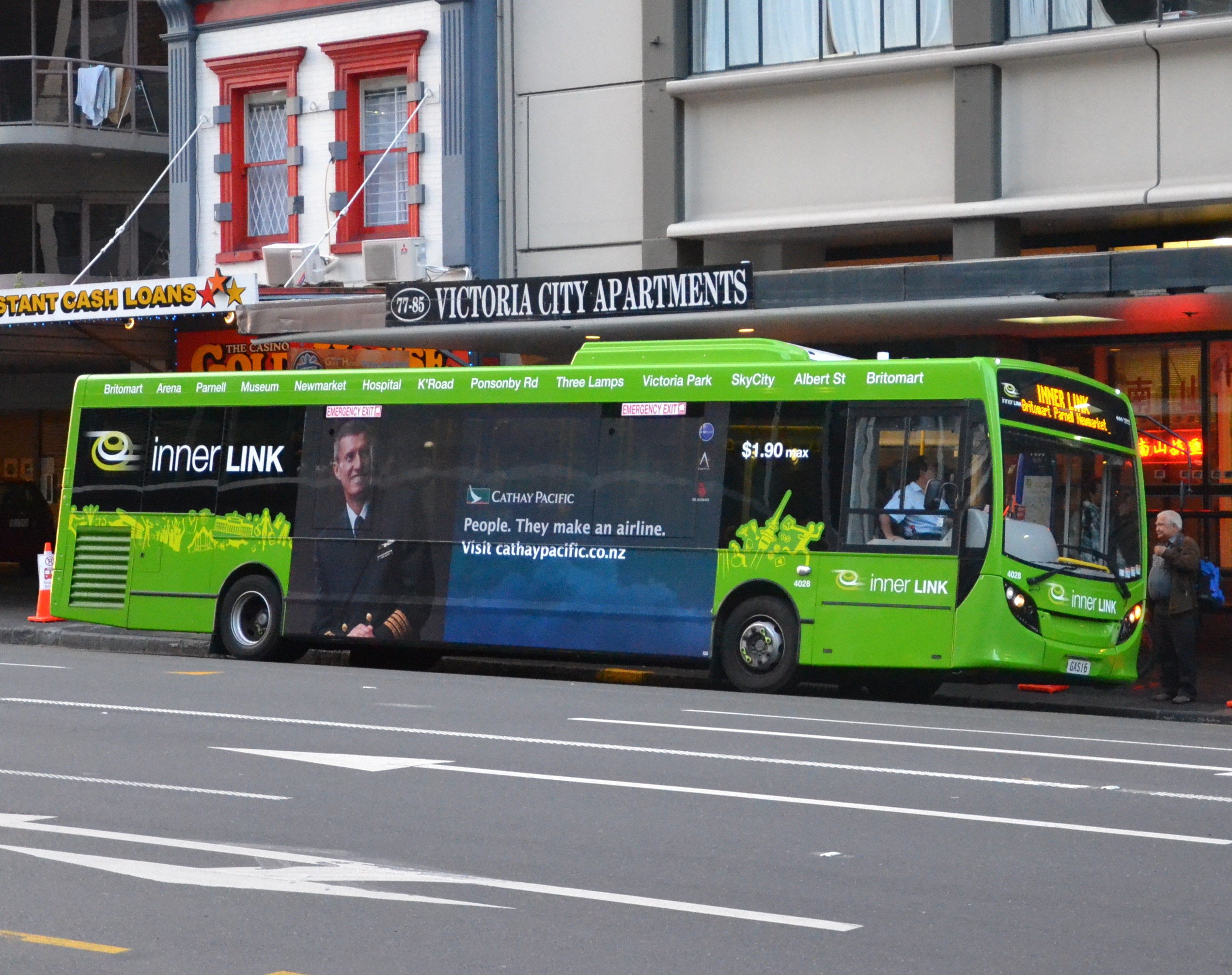 Inner Link bus in Auckland